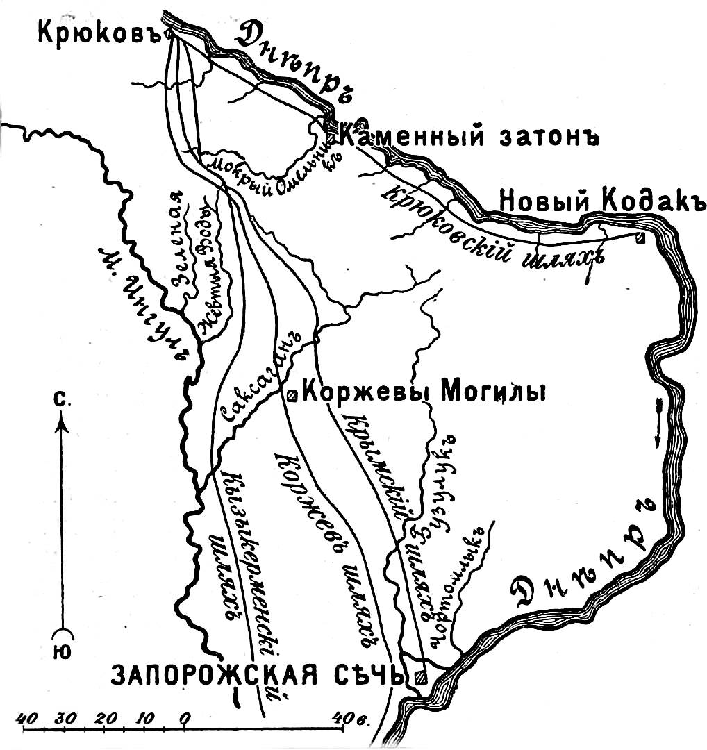 Это изображение было использовано для иллюстрирования статьи «Жевтые Воды» опубликованной в десятом томе «Военной энциклопедии», который был издан книгоиздательским товариществом И. Д. Сытина в 1912—1913 гг. в столице Российской империи городе Санкт-Петербурге.